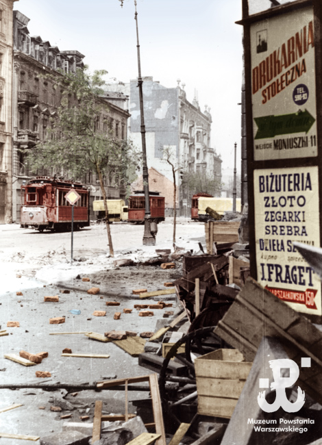 Kadr z filmu "Powstanie Warszawskie"